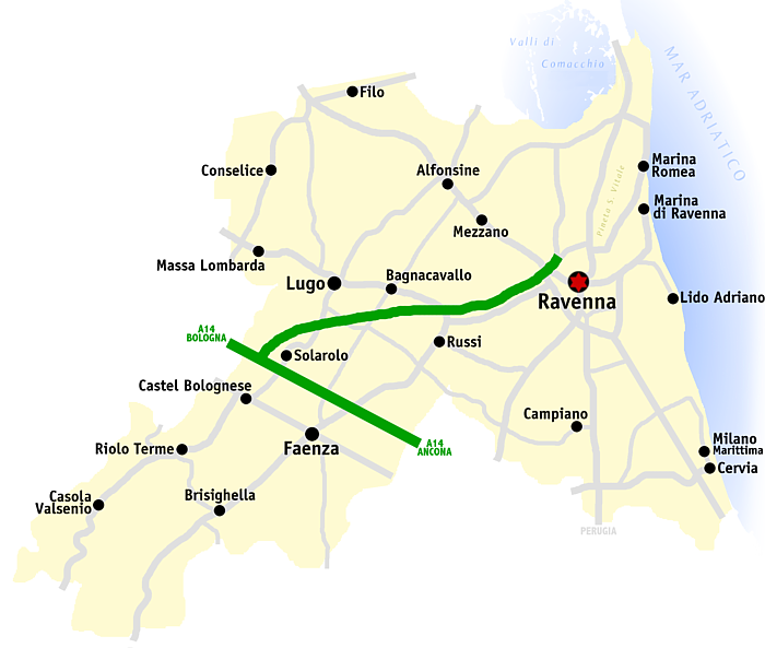 Kaart van de provincie Ravenna